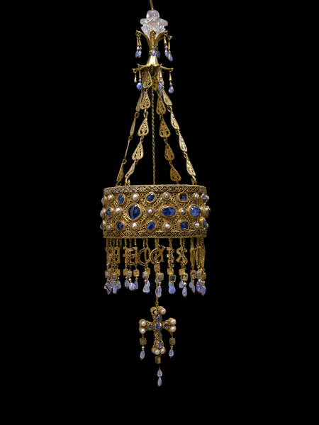 Tesoro de Guarrazar (Corona de Recesvinto) (Reino hispanovisigodo). Número de inventario: 71202.